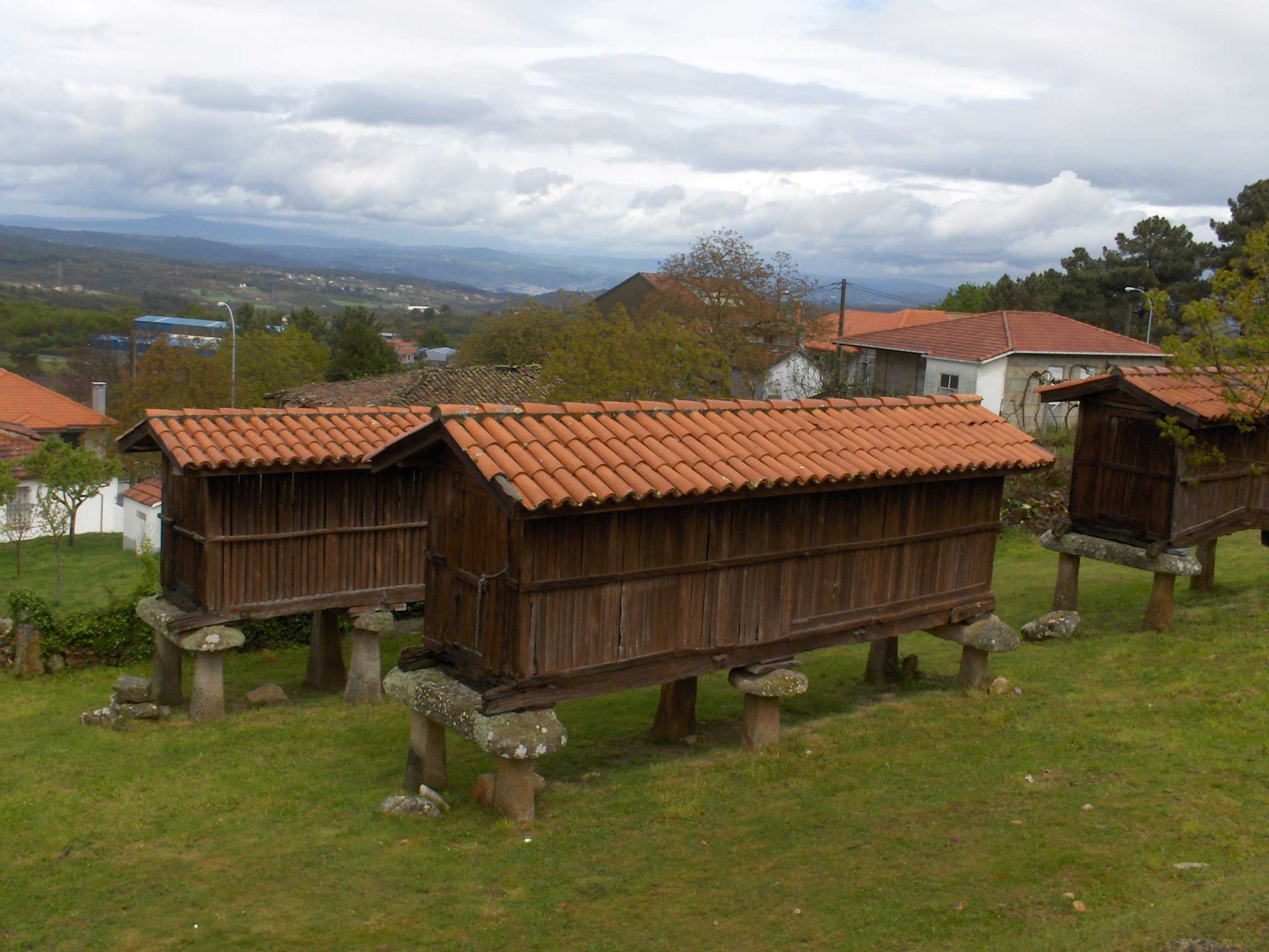 A Merca, Ourense